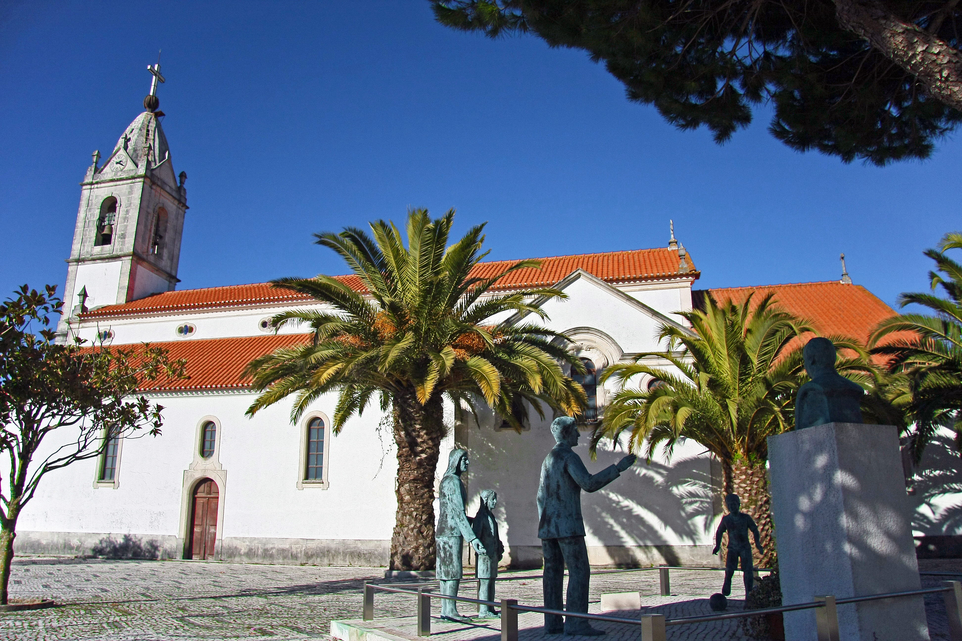 Aí, os videntes foram baptizados e fizeram a sua inserção na comunidade cristã. À entrada, do lado esquerdo da porta principal, encontra-se a Pia Baptismal onde os três pastorinhos Lúcia, Francisco e Jacinta foram baptizados.